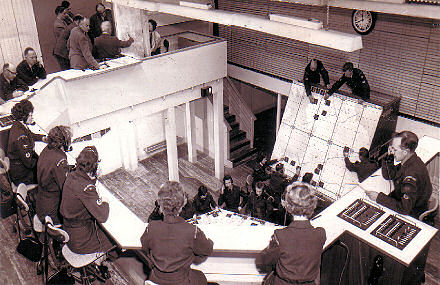 ROC centre operations